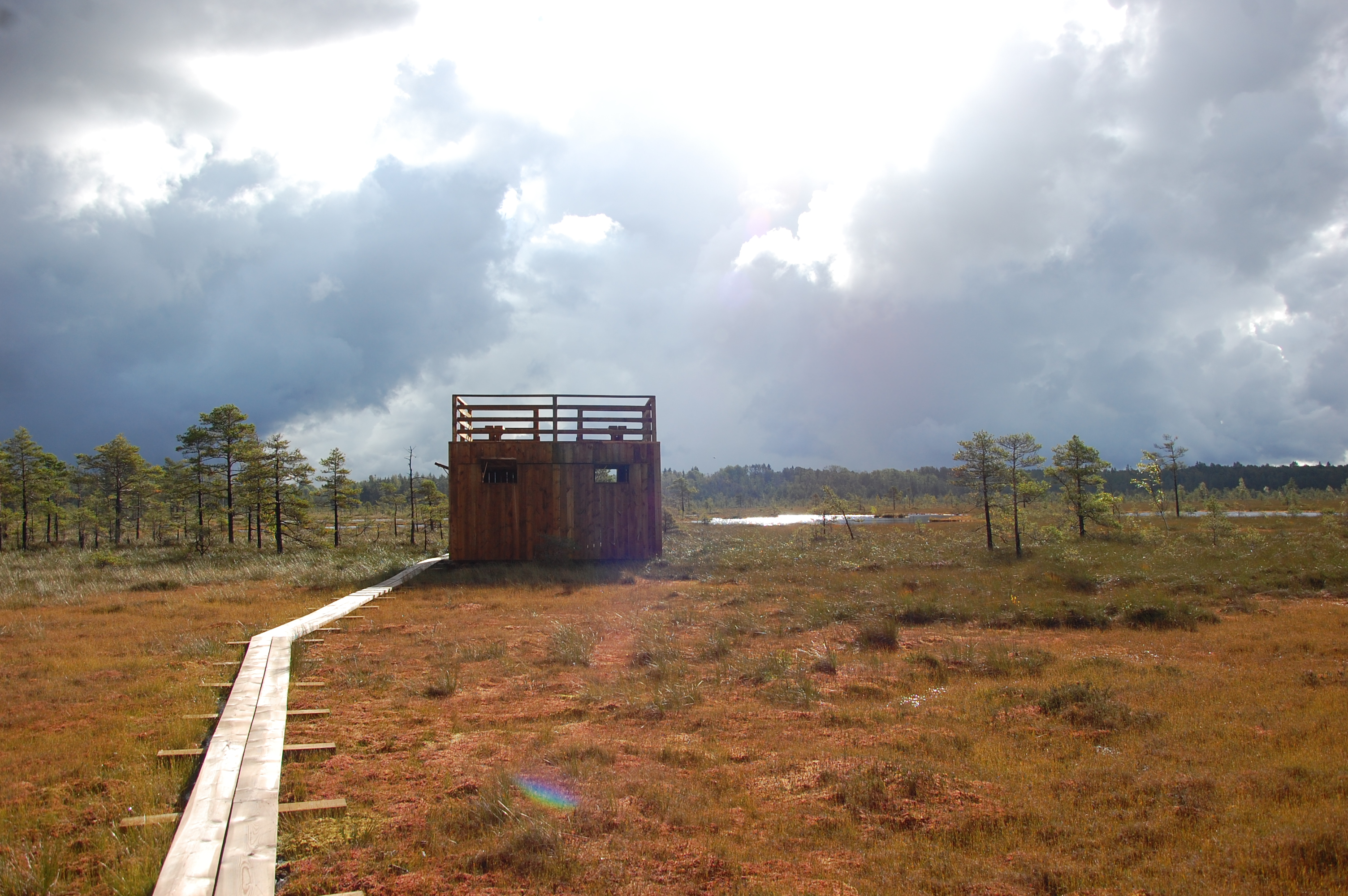 Nigula raba vaateplatvorm